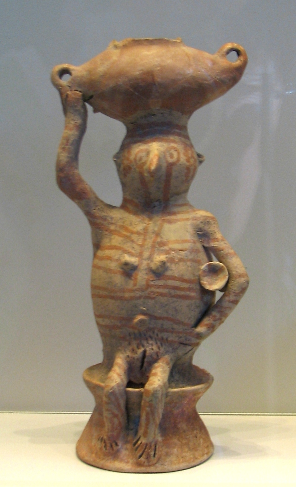 Vessel in the shape of a woman carrying a churn - Chalcolithic Age. Gilat, Negev Israel כלי בדמות אשה נושאת מחבצה. מהתקופה הכלקוליתית 3,500-4,500 לפני הספירה. מאתר "גילת" שבנגב מוזיאון ישראל